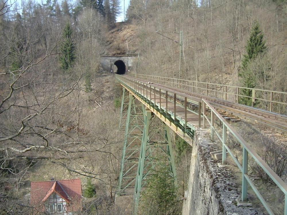 Krocksteinviadukt